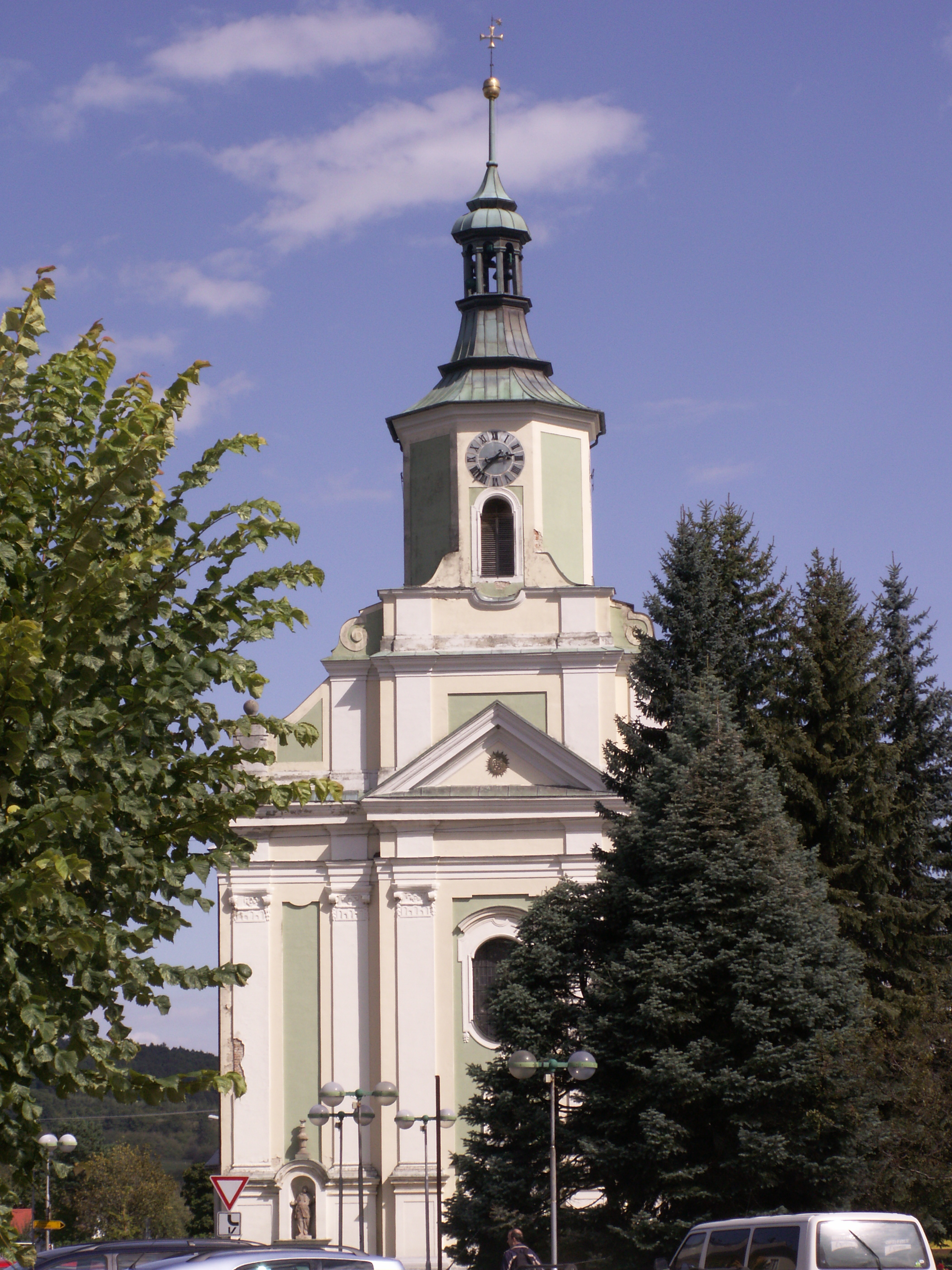 Město Albrechtice (okres Bruntál), kostel Panny Marie